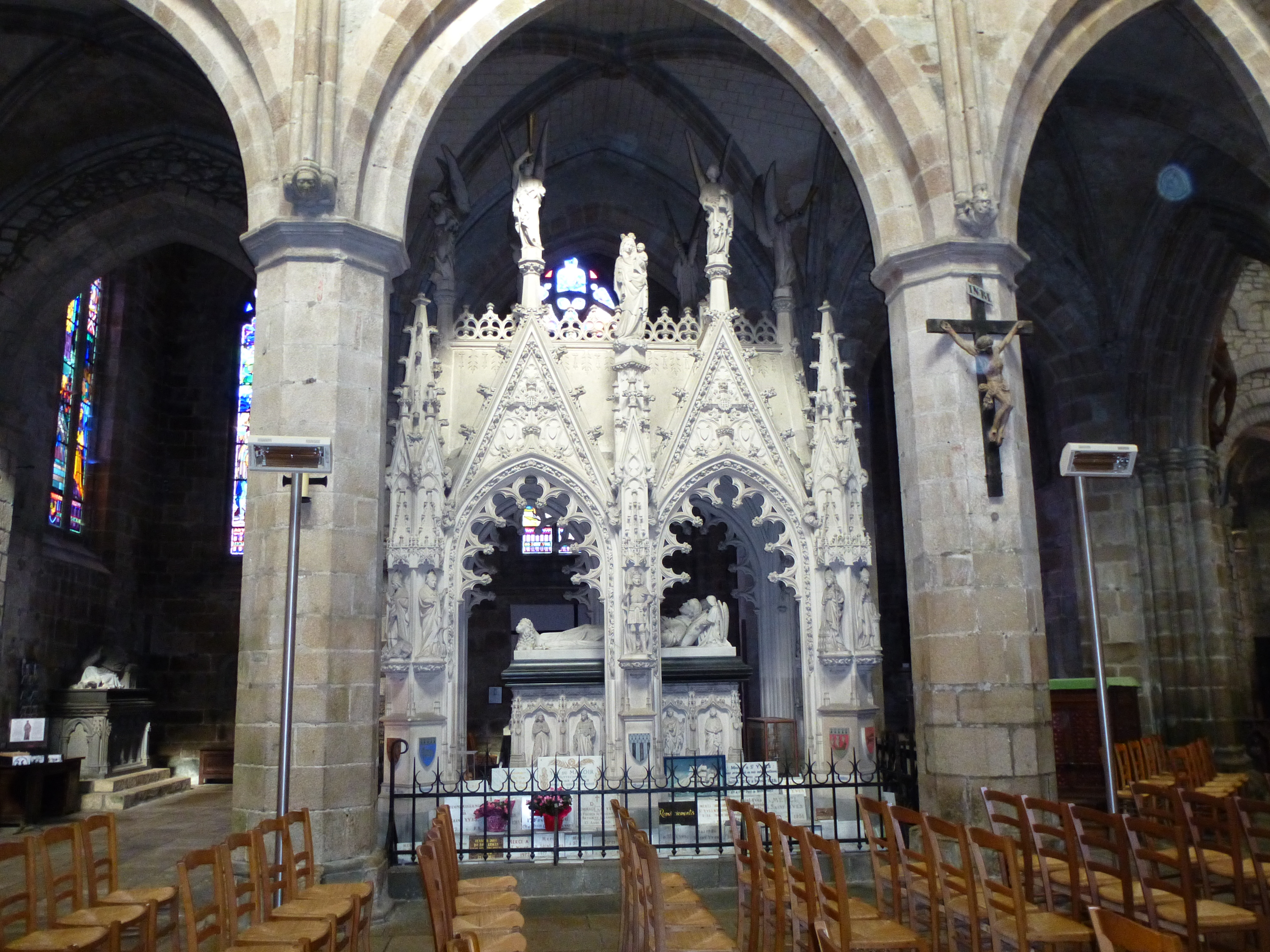 la cathedrale st tugdual a treguier